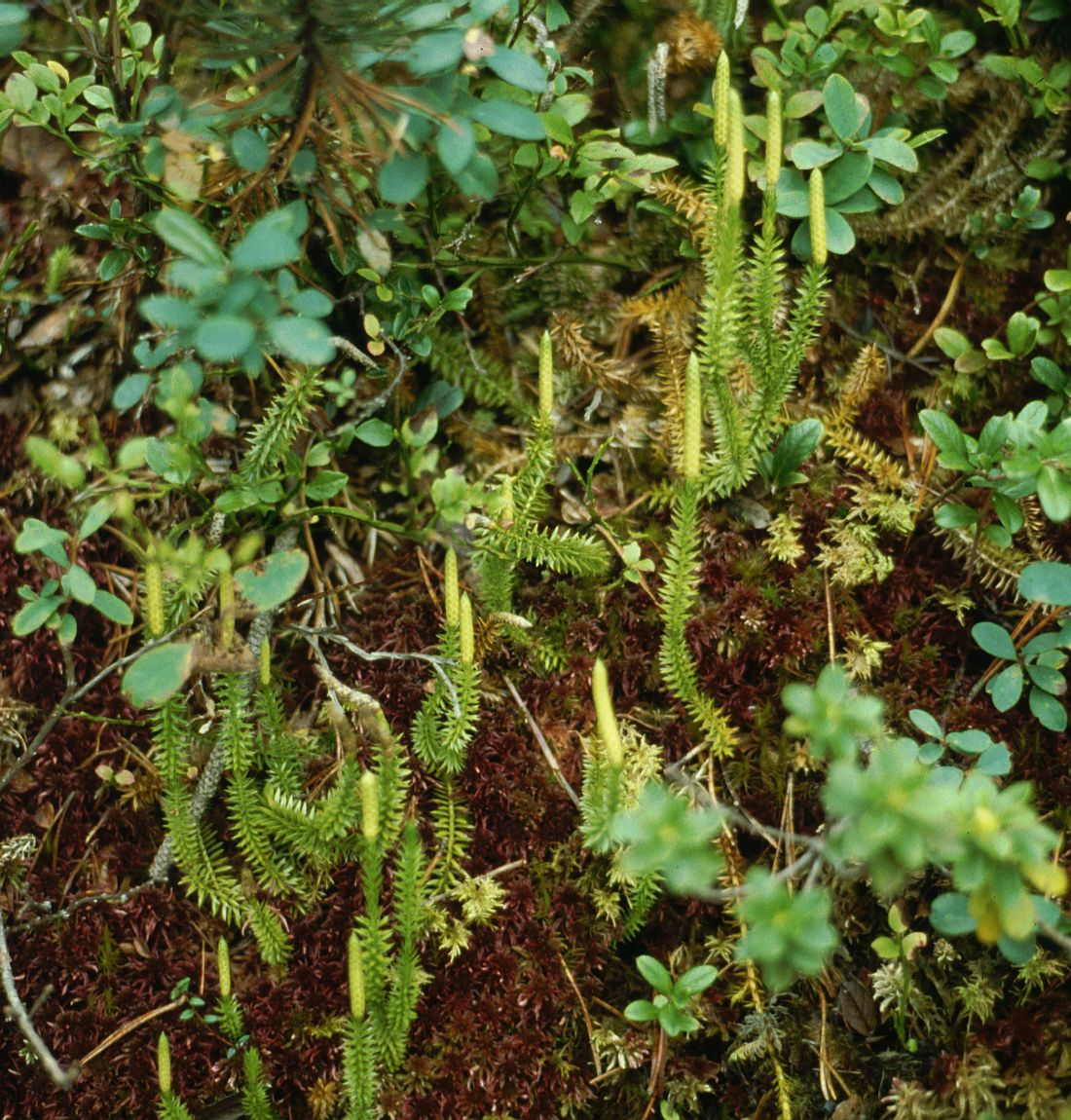 Schlangen-Bärlapp (Lycopodium annotinum), Bärlappgewächse (Lycopodiaceae) - Österreich/Austria/Autriche: Tirol, Fernpass, Südwestufer des Blindsees